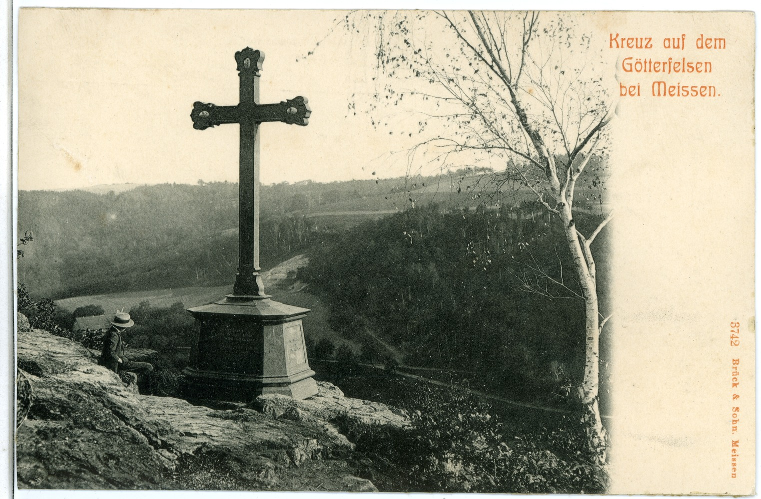 Meißen; Kreuz auf dem Götterfelsen This postcard is from publisher Brück & Sohn in Meißen ( This postcard has a unique number 03742 and is available in a higher resolution at the publisher. This images was uploaded in a cooperation project between Wikipedians and the publisher.